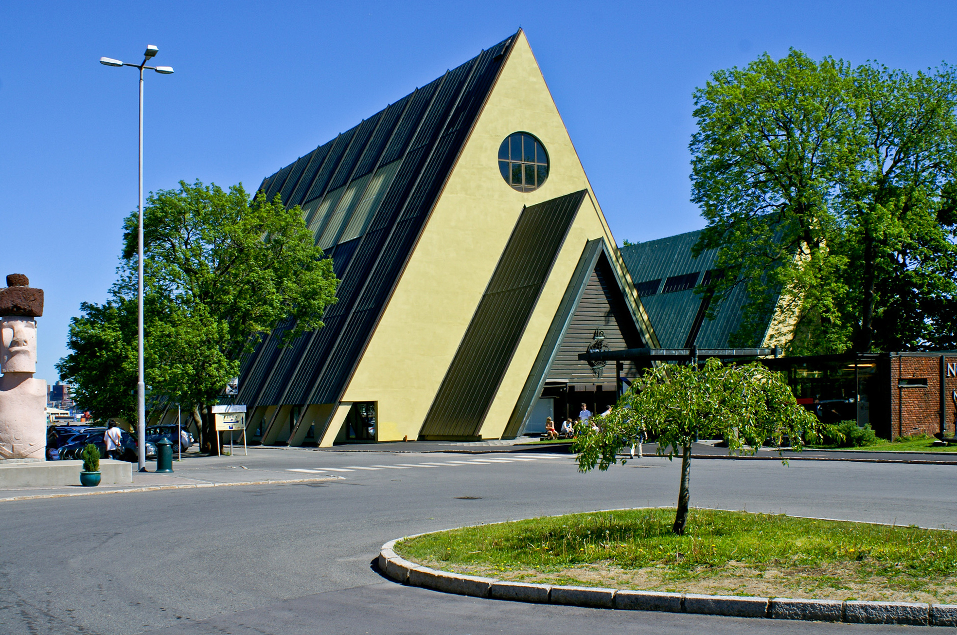 Fram Museum, Oslo